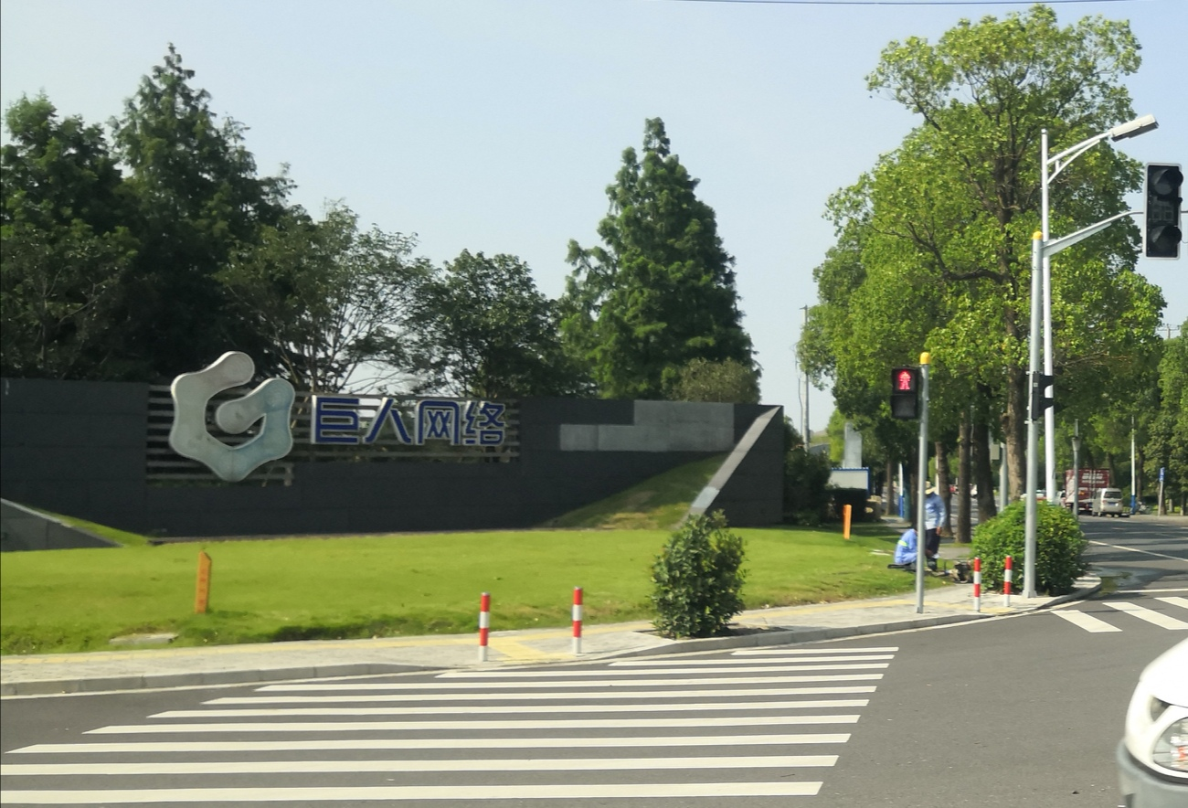 巨人网络松江新城本部，大门位于广富林路